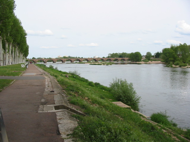 La Loire, plus long fleuve de France avec environ 1.014 kilomètres, arrose Nevers un peu avant le milieu de son cours. C'est à Nevers que s'y jettent ses affluents de l'Allier et de la Nièvre.